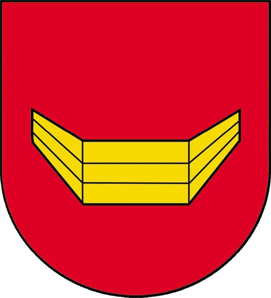 Herb gminy Turobin